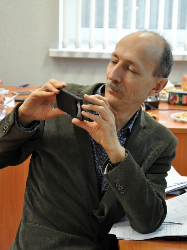 Беклемишев Михаил Константинович, д.х.н., ведущий научный сотрудник химического факультета МГУ